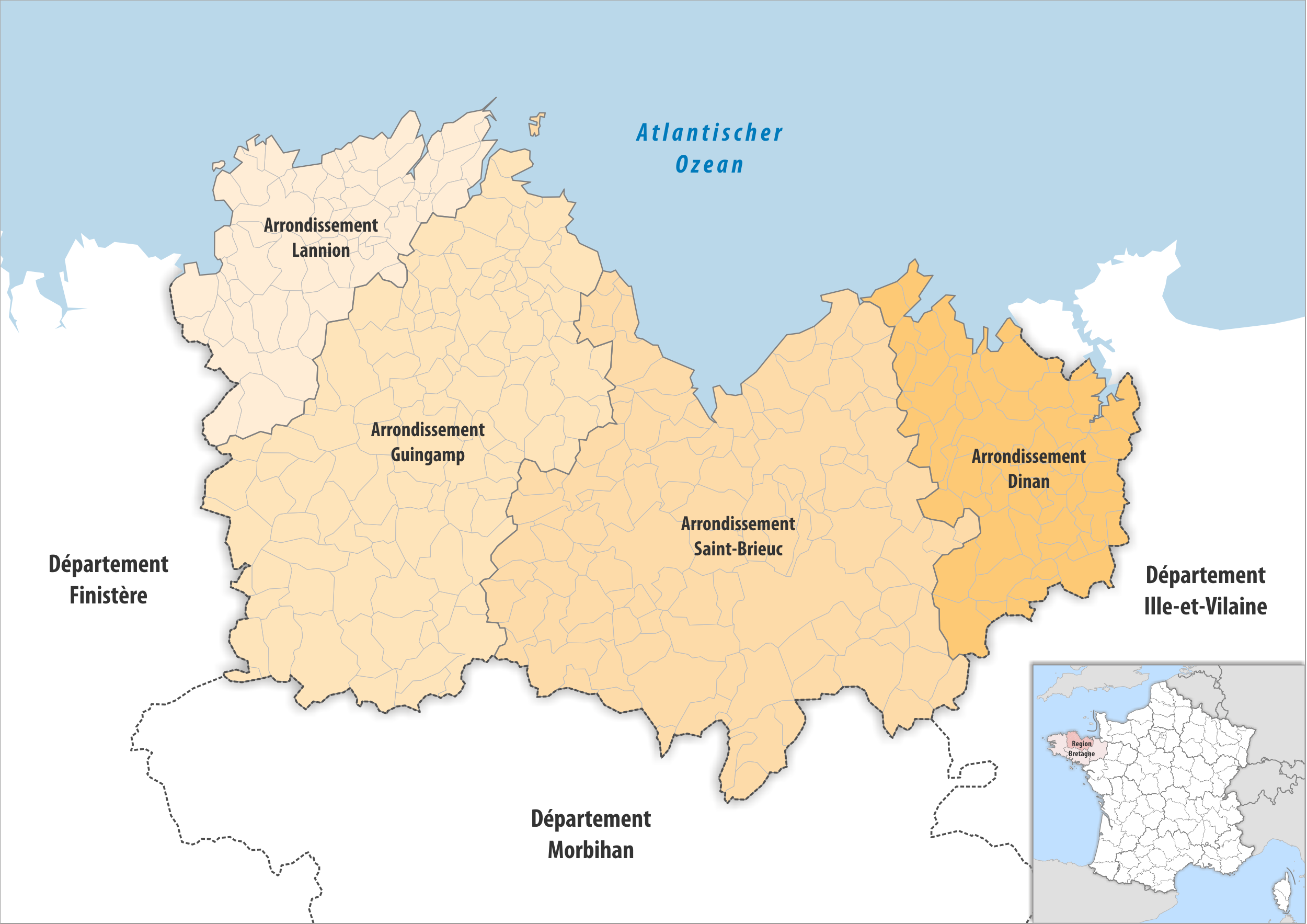 Gemeinden und Arrondissemente im Departement Côtes-d’Armor